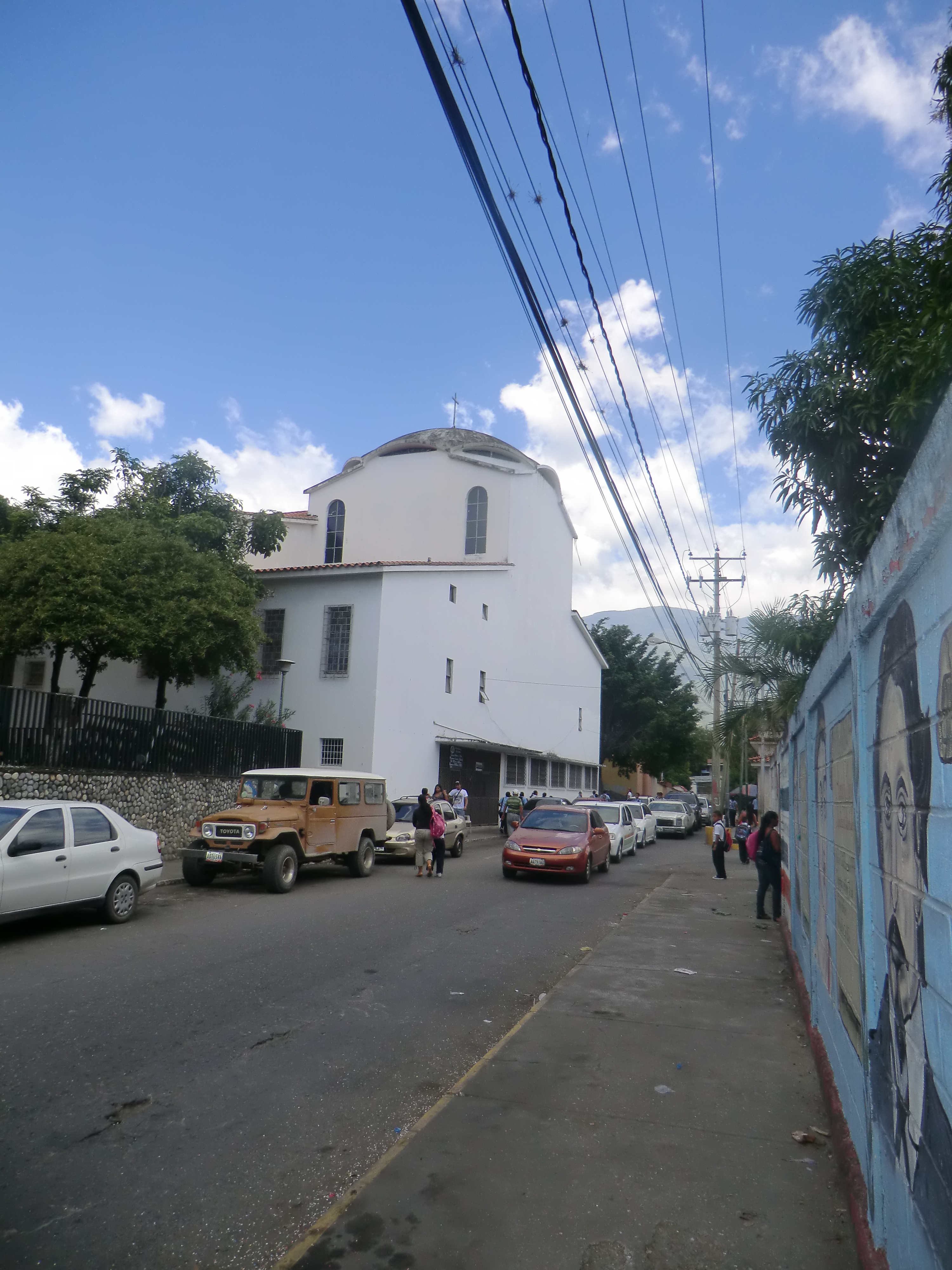 Una vista de la calle 9 de diciembre en Guatire, Venezuela